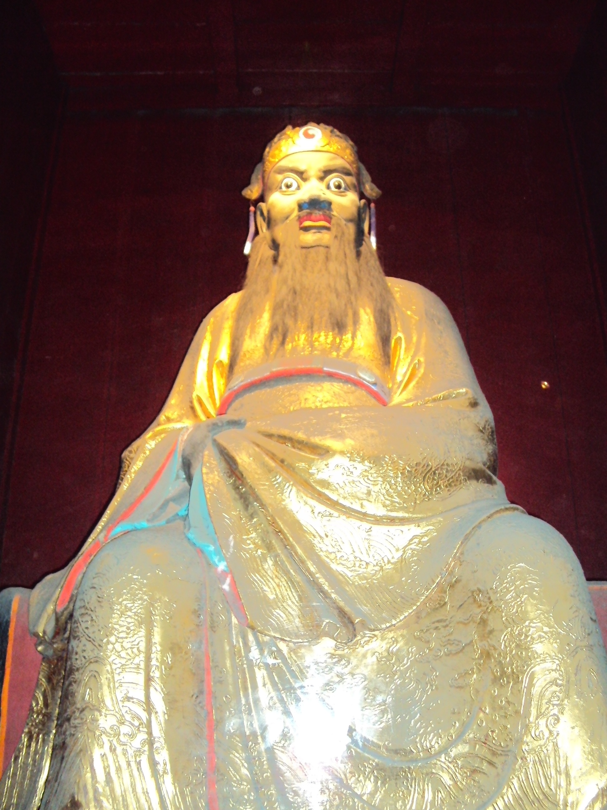 成都武侯祠内张飞的塑像